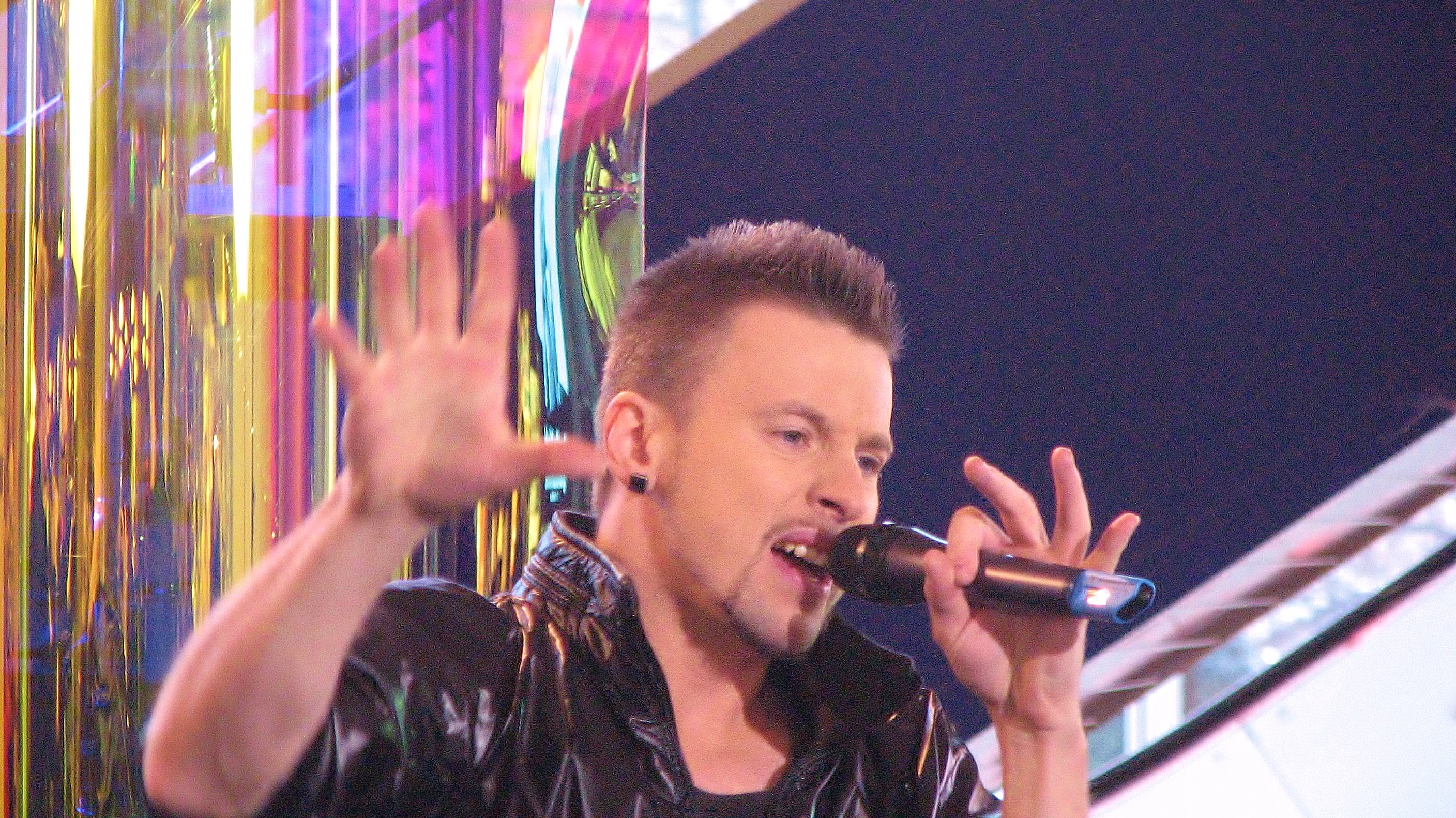 Sergei Morgun Ringvaate Eesti Laulu salvestusel ansambli POP Maniacs koosseisus